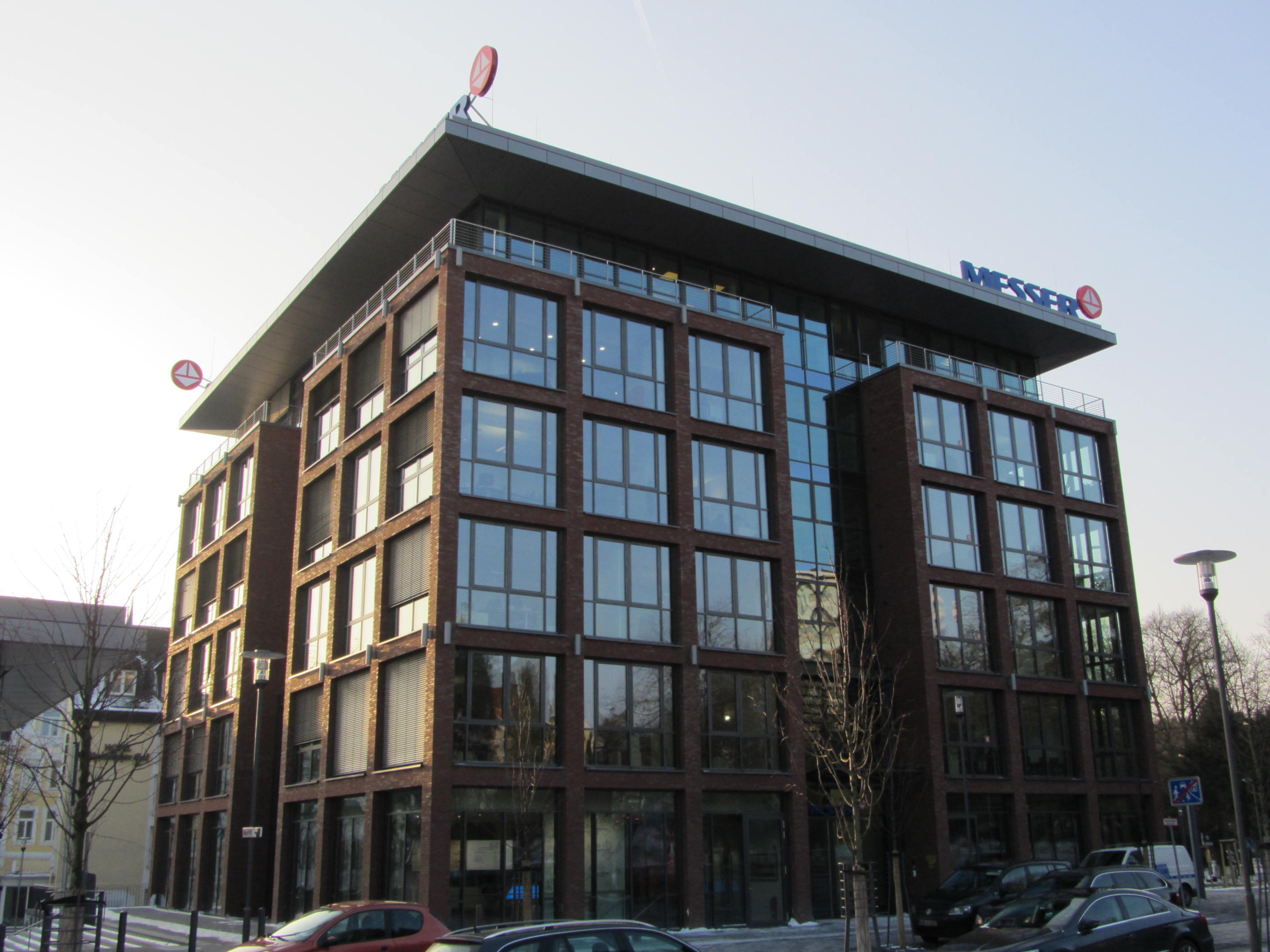 Gebäude der Messer Group Ag in Bad Soden am Taunus